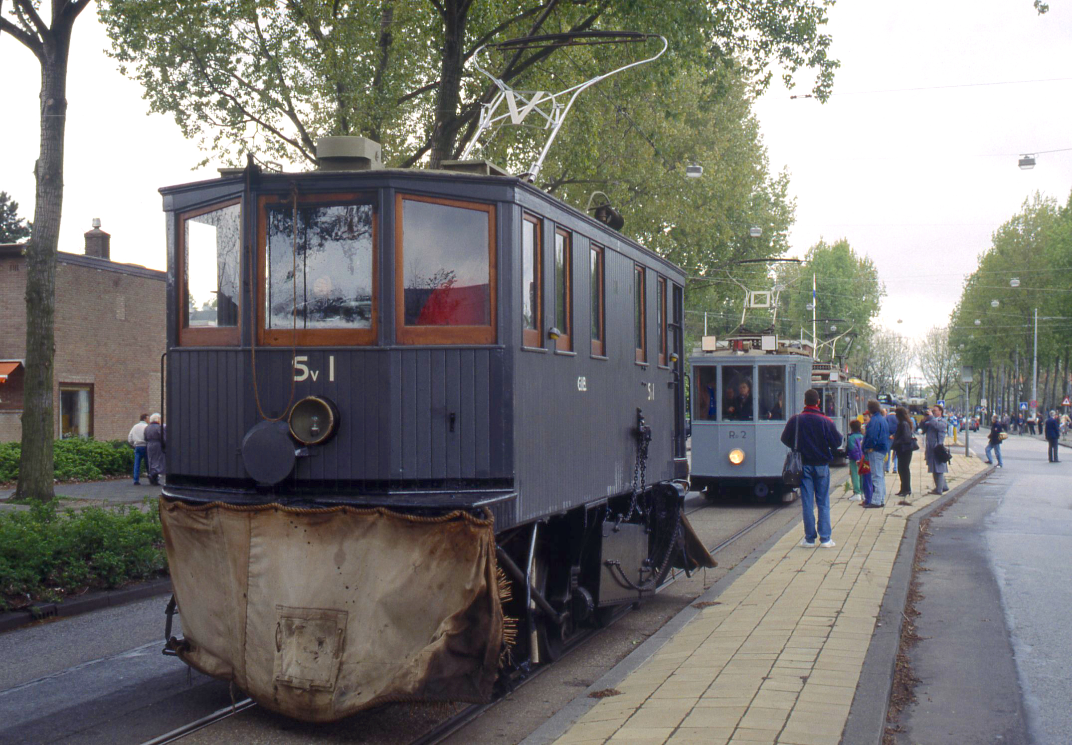 Tramparade in Amsterdam ter viering van het zestigjarige verjaardag van de NVBS. Hier de sneeuwveger Sv 1.